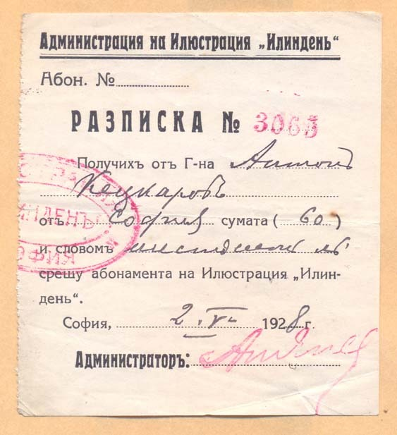 Разписка на Илинденската организация, подписана от Антон Кецкаров